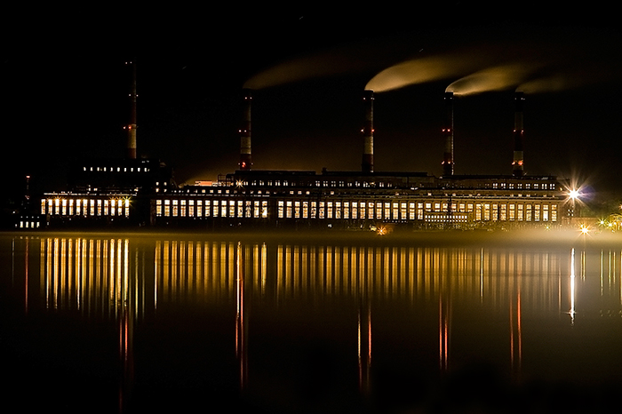 Южноуральская ГРЭС